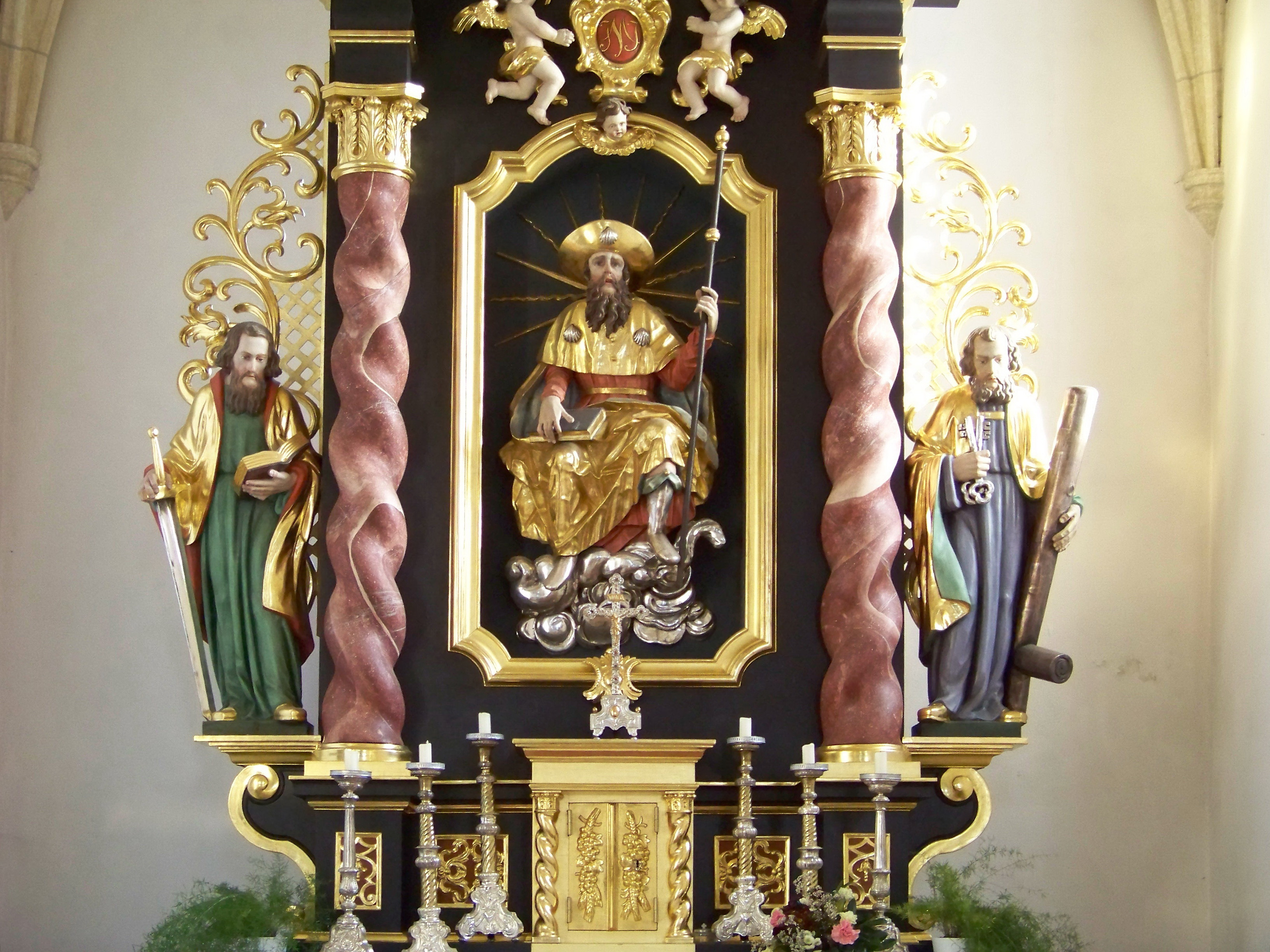 Obersüßbach, Kirchgasse 7, Katholische Pfarrkirche St. Jakobus der Ältere. im Kern romanische Chorturmanlage, spätgotisch verändert, 1877/80 neugotisch erweitert durch Verlängerung nach Westen und Anbau der Seitenschiffe. Hochaltar mit gewunden Säulen. Im Zentrum Figur St. Jokobus d. Ä. in der Glorie. Seitenfiguren links St. Paulus mit Buch und Schwert, rechts St. Peturs mit Schlüsseln und Petruskreuz.